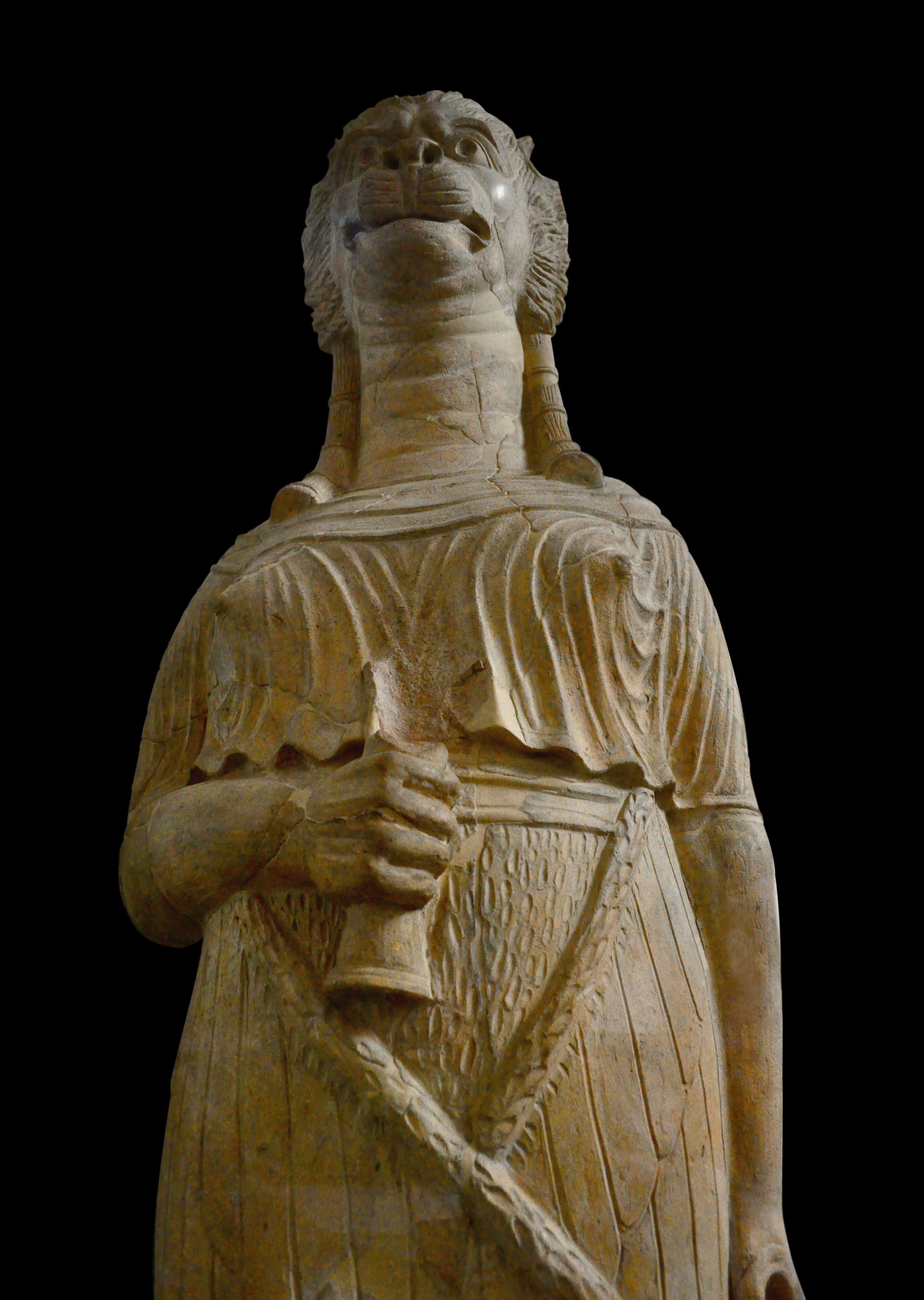 Tanit léontocéphale, statue exposée au musée national du Bardo (Tunisie)